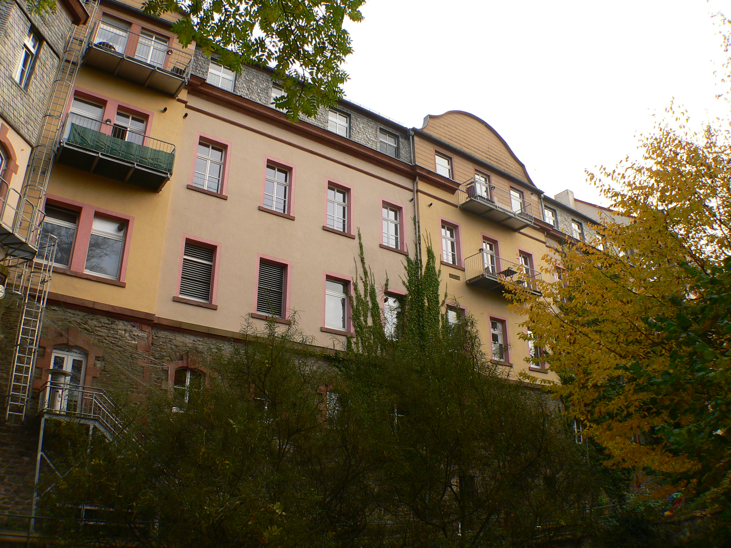 Ingelheim'sches Palais in Wetzlar, Deutschlnad, Hessen. Rückansicht (Lahnseite).